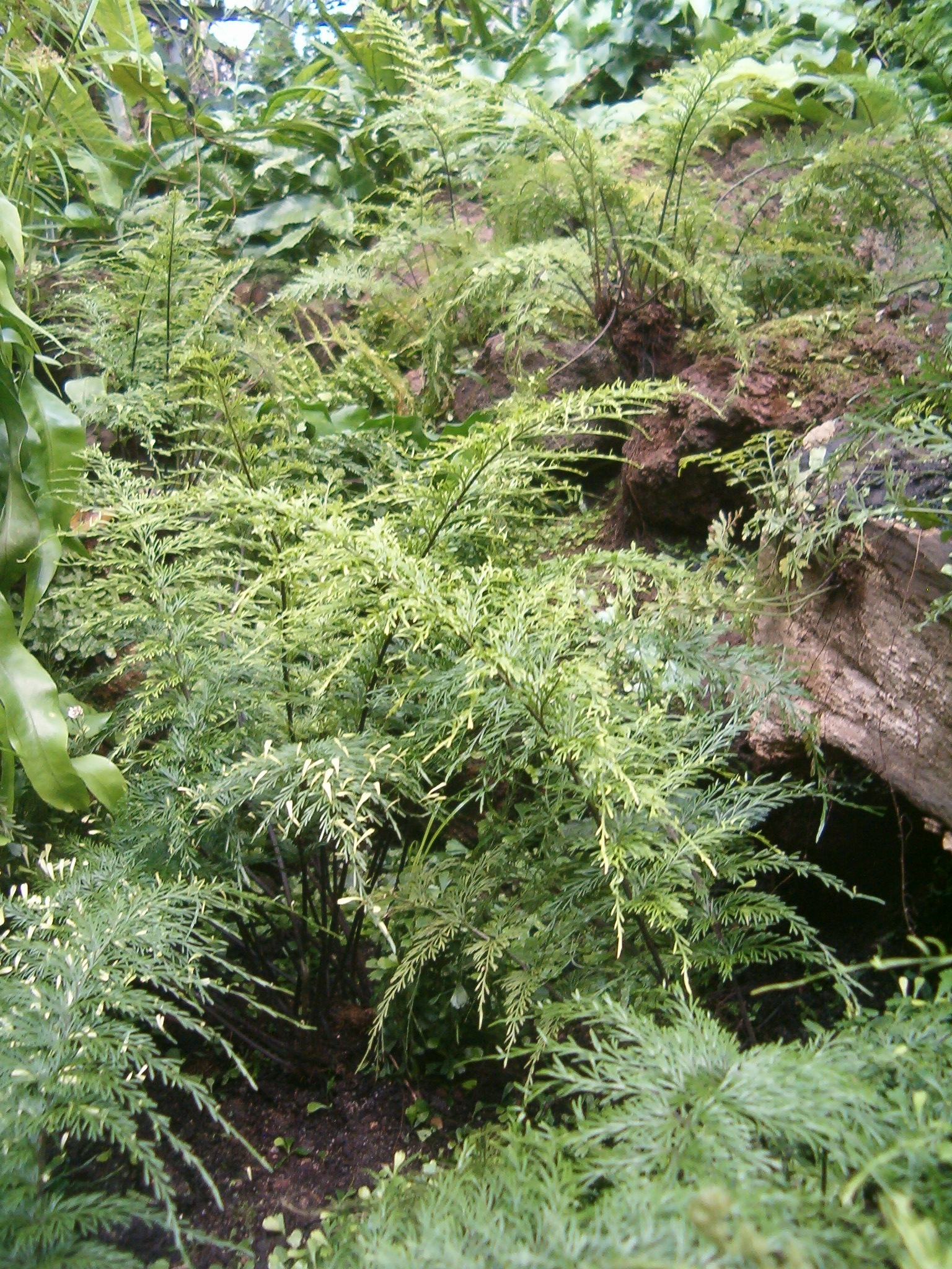 At Botanical Gardens Berlin-Dahlem Species Asplenium daucifolium